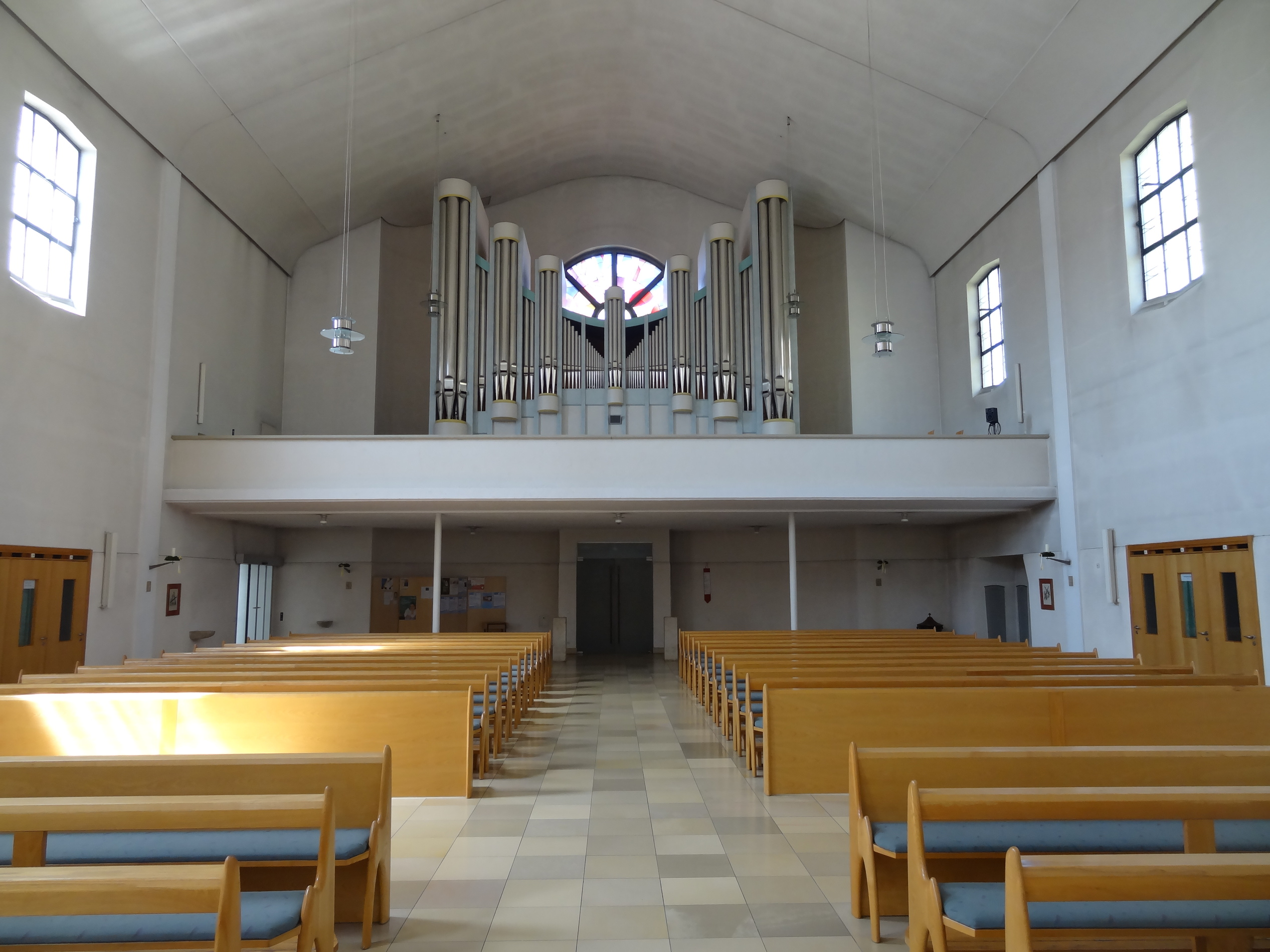 Pfarrkirche St. Wolfgang in Landshut - Innenraum gegen Westen (zu sehenː Westportal, Westempore mit Jann-Orgel, Volksgestühl und Beichstühle)